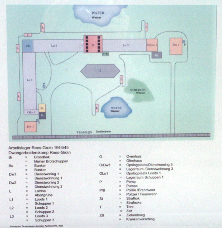 Rees, Deutschland Lageplan Zwangsarbeitslager Groin